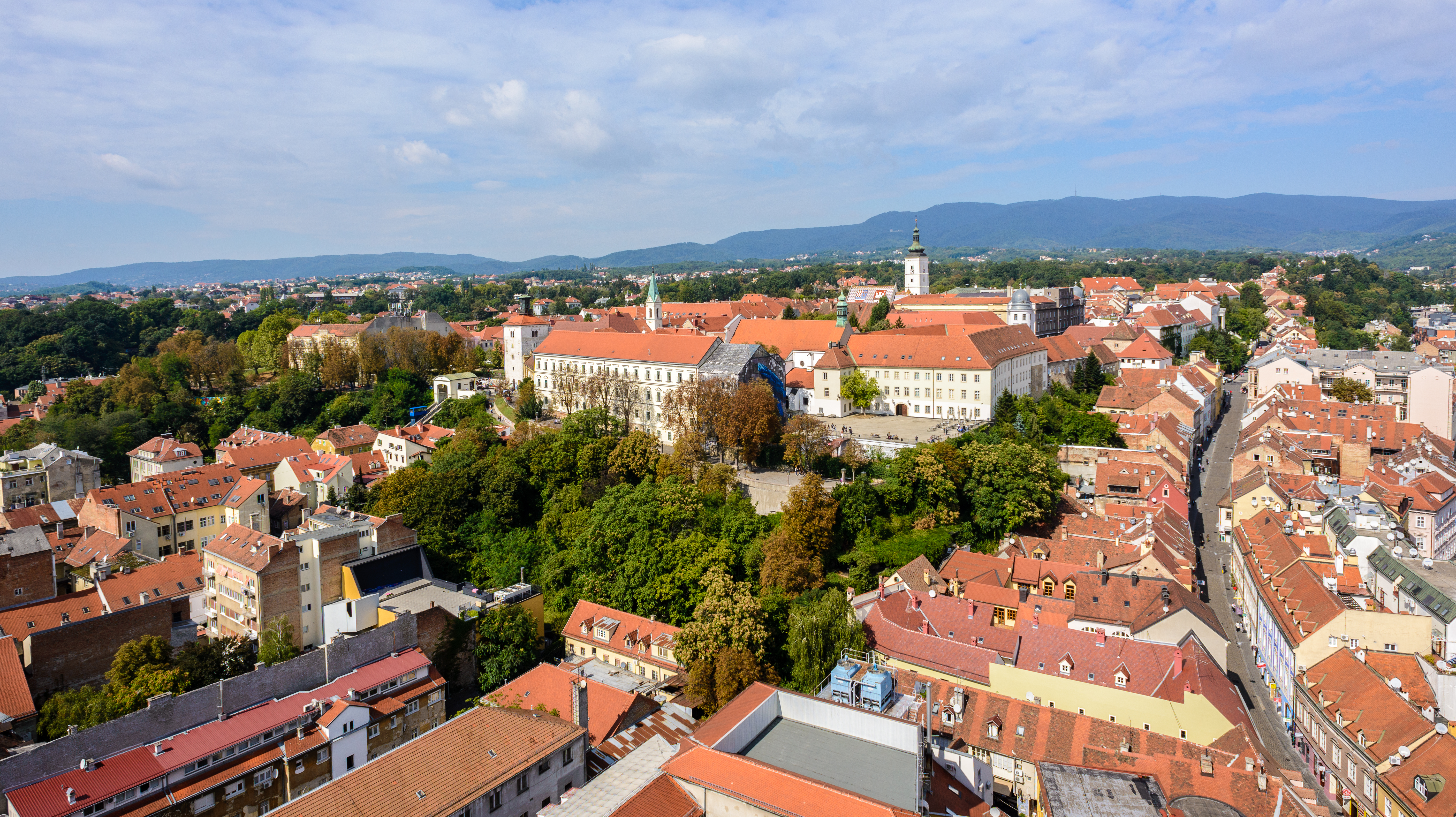 Zagreb